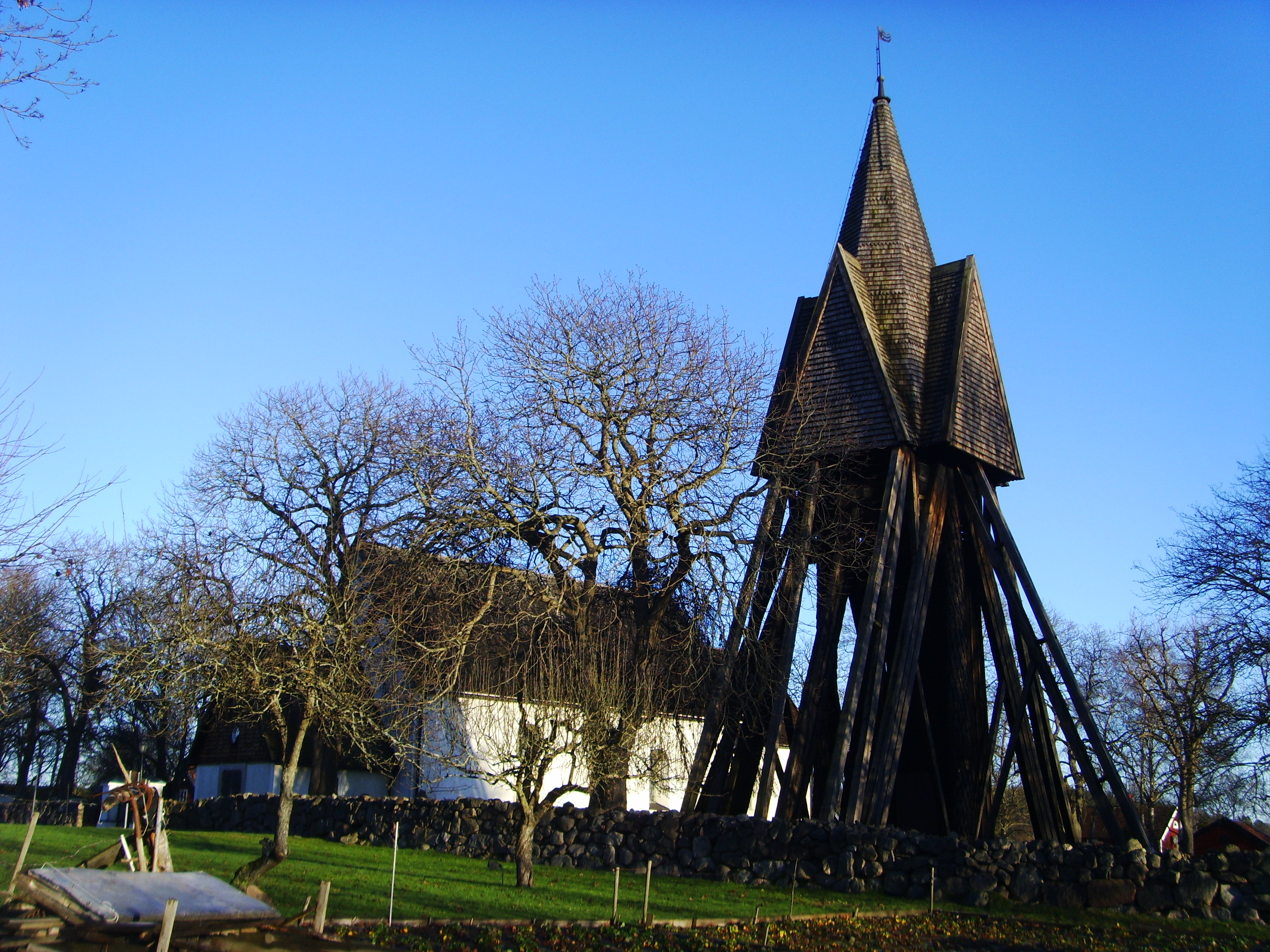 Kullerstads kyrka i Linköpings stift.